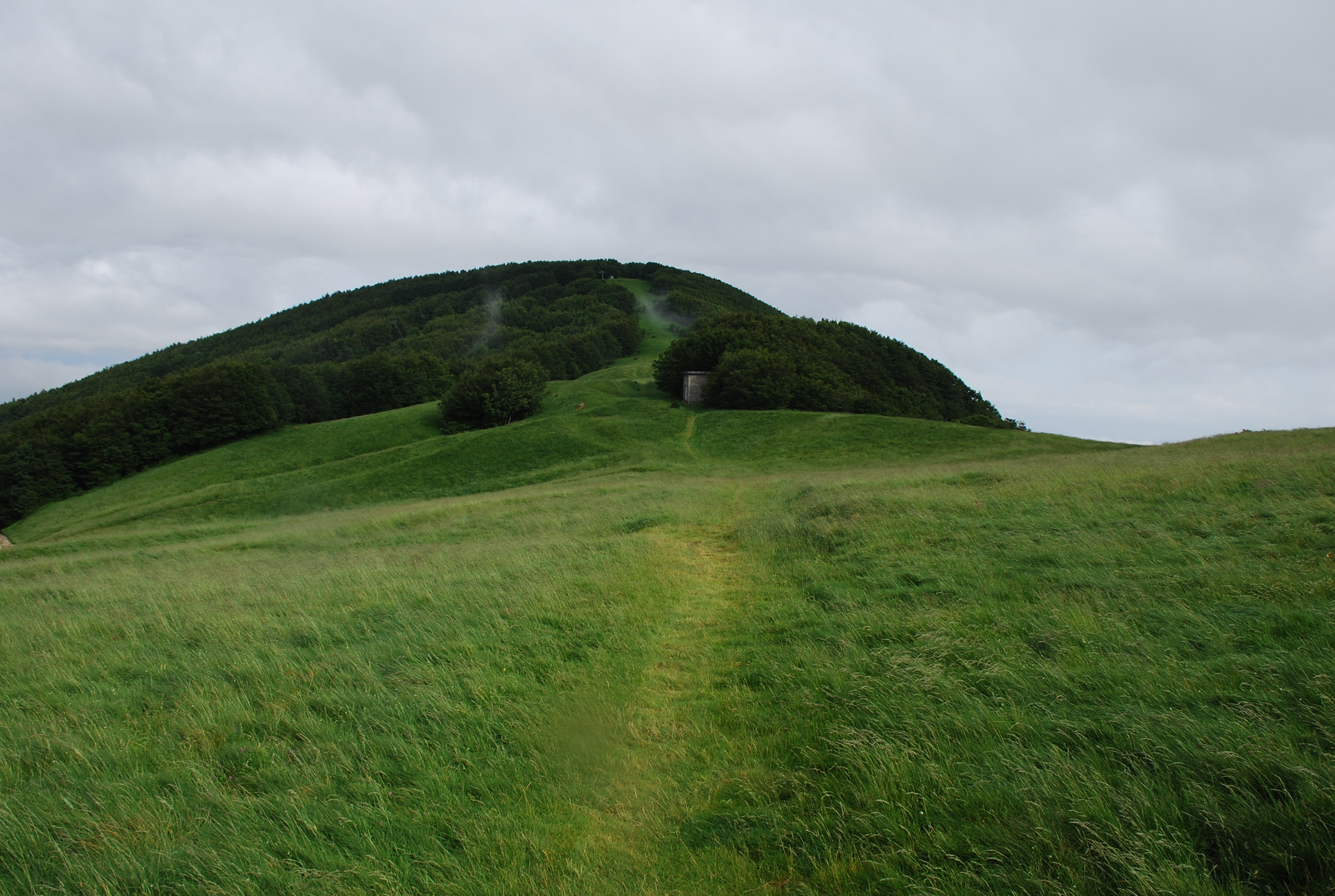 Prati della Burraia 1500 m.(Monte Falterona) Santa Sofia (FC) 14 Giugno 2015